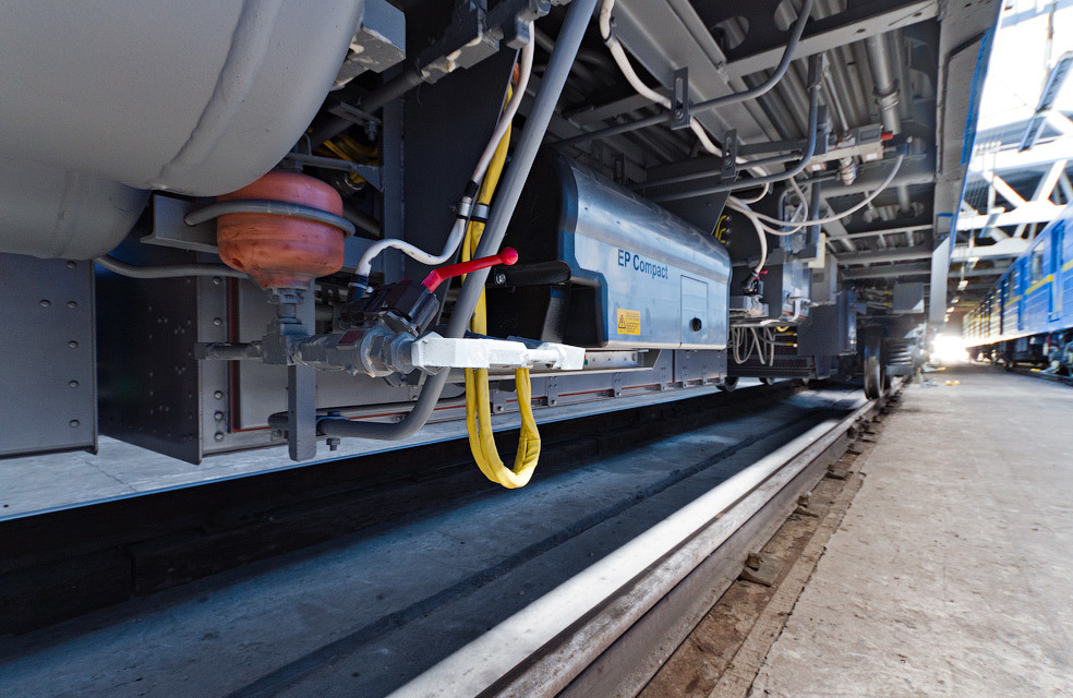 Подвагонное оборудование моторного вагона Е-КМ-Пм